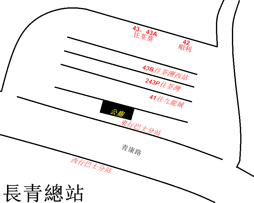 中文（香港）: 長青巴士總站的平面圖